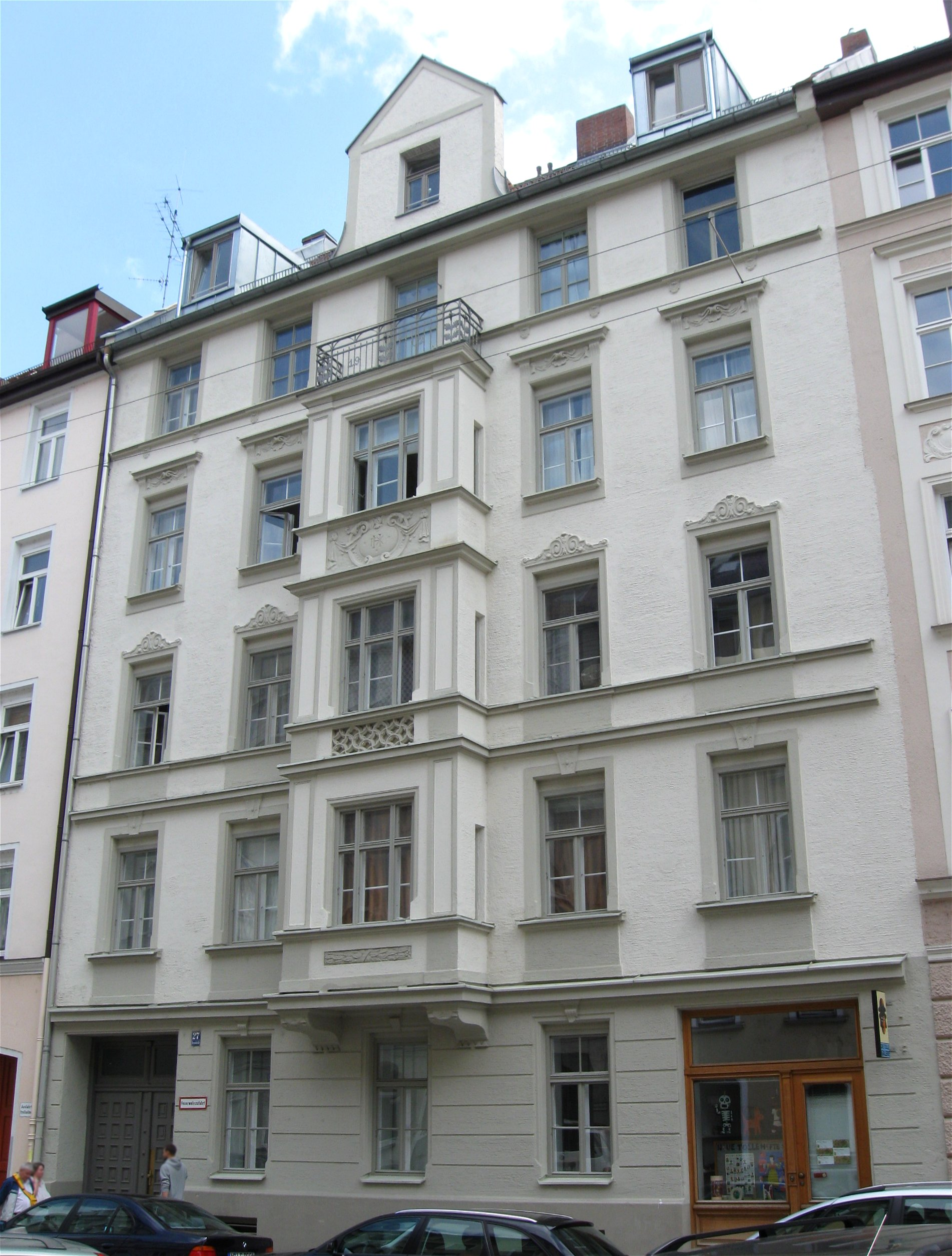 Dreimühlenstraße 27; Mietshaus, Neurenaissance, mit Stuckdekor, 1902 von Hans Thaler.